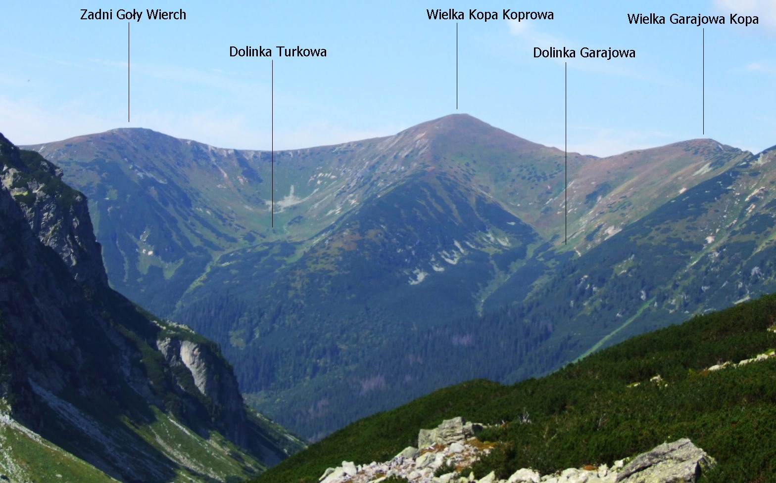 Widok na Liptowskie Kopy z Doliny Hlińskiej